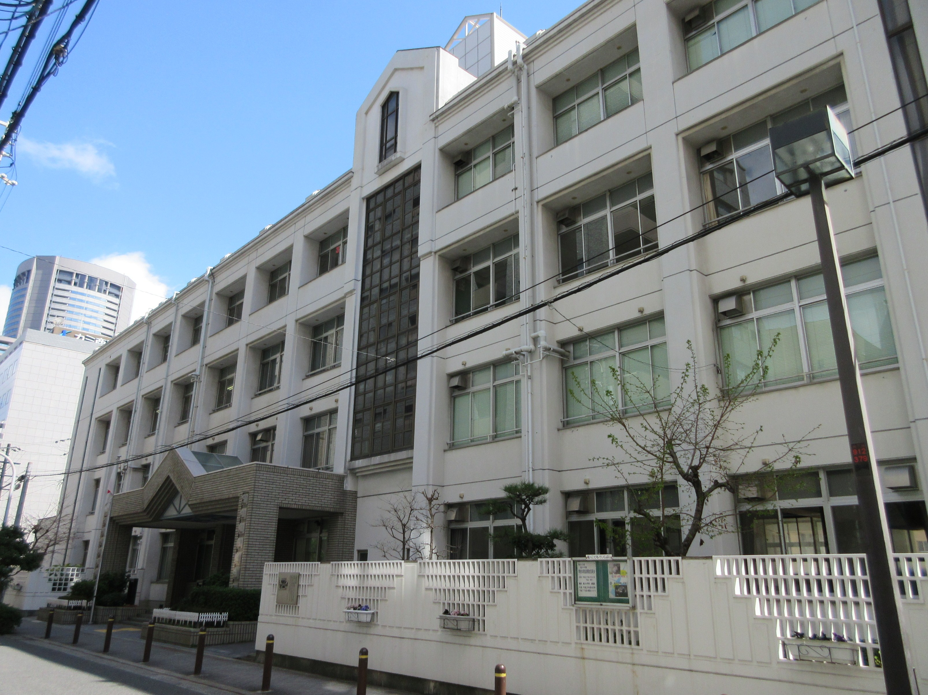 大阪市立滝川小学校